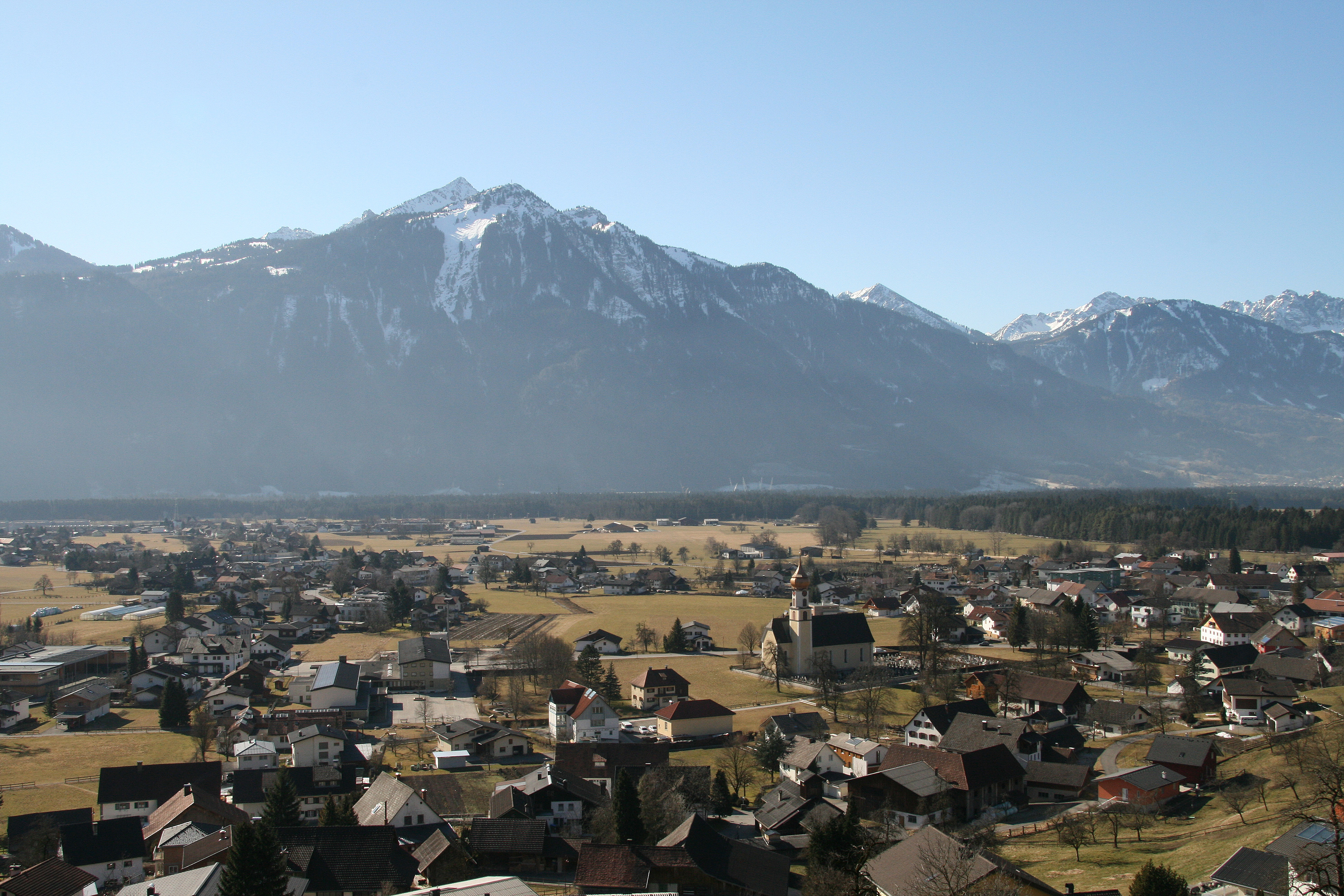 Ludesch in Vorarlberg. Blick von der L88 Richtung Raggal.